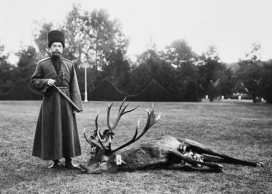 Николай II на охоте в Спале.